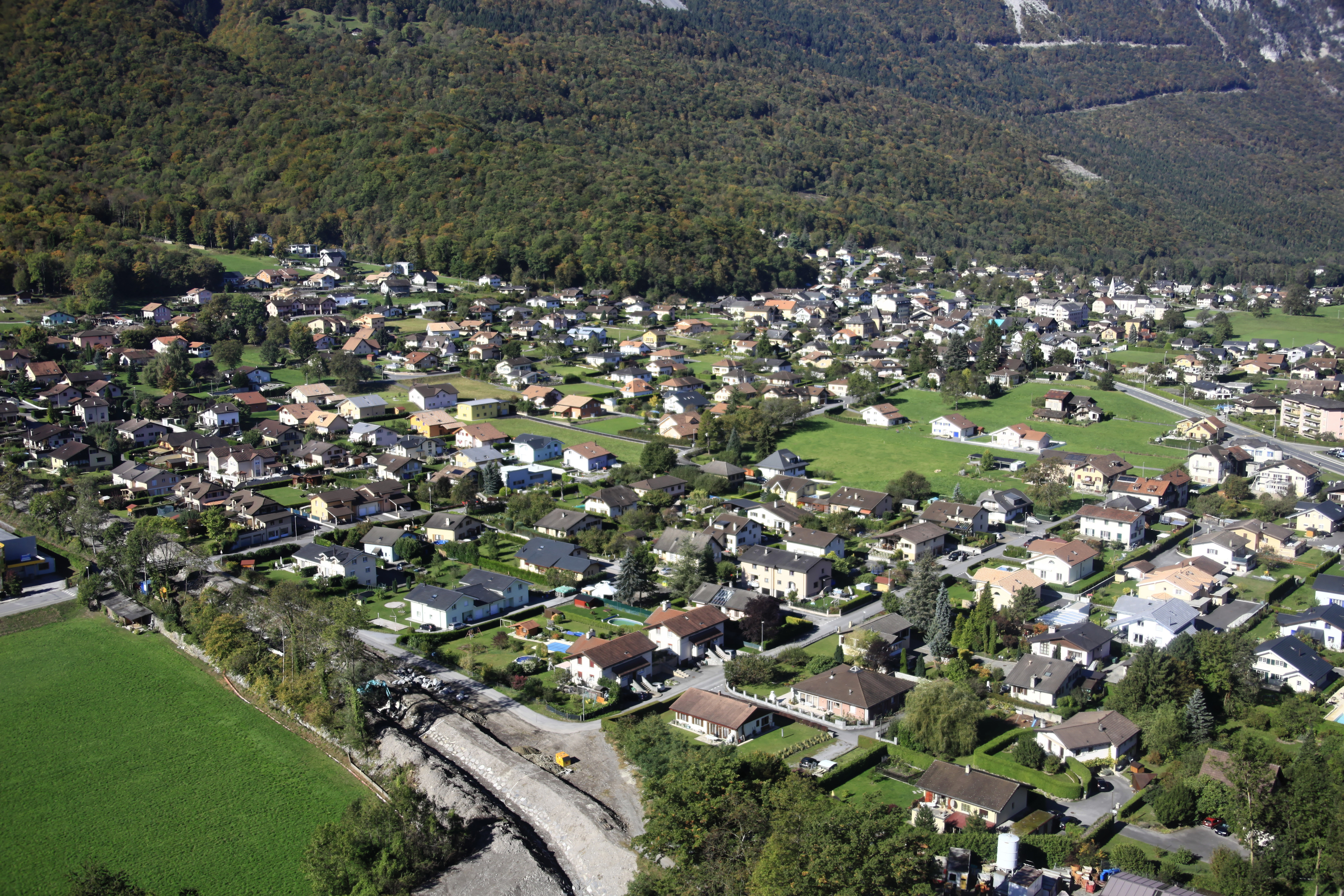 Vue aérienne du village d'Illarsaz